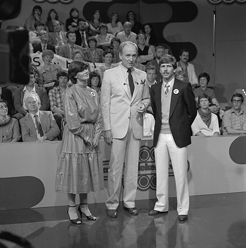 Fred Oster temidden van kandidaten in AVRO's Wiekentkwis